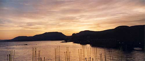 Lac de Neuchâtel (Suisse) au coucher du soleil